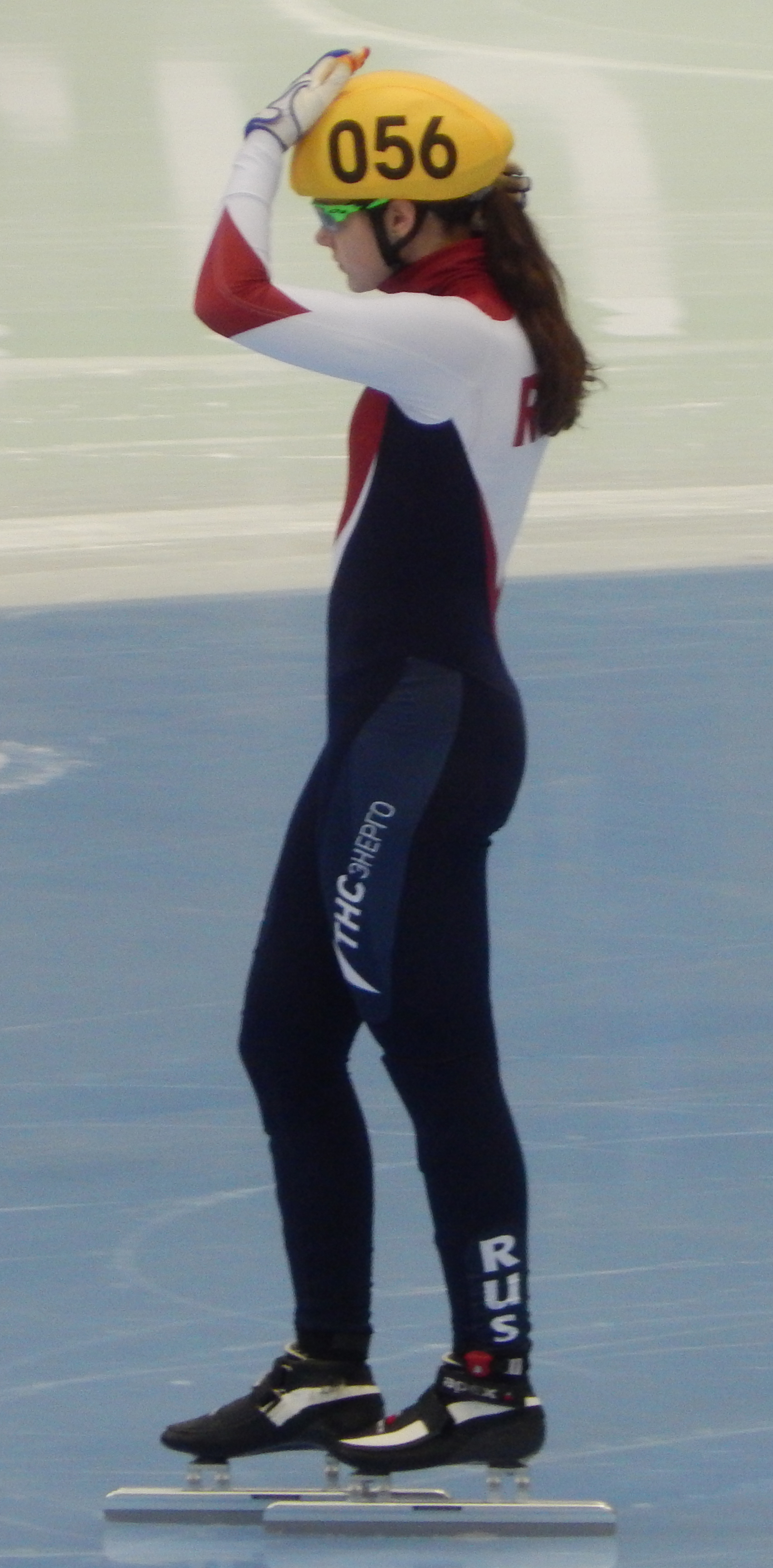 Софья Просвирнова, чемпионат мира 2015